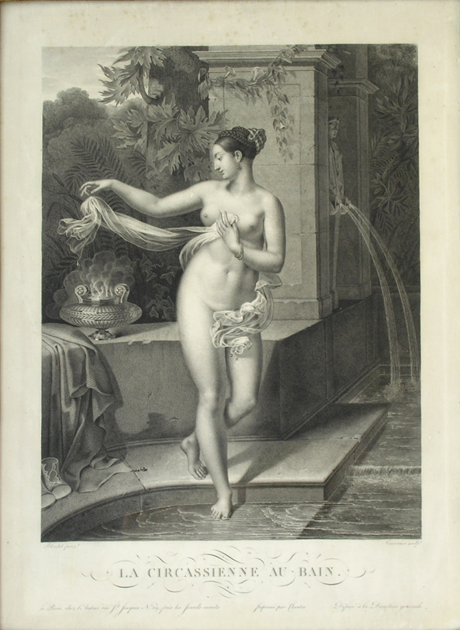 Lithographie de Pierre-Joseph Tavernier d'après le tableau de Merry-Joseph Blondel peint en 1814.